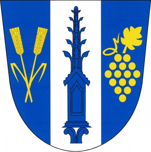 znak, Práče, okres Znojmo